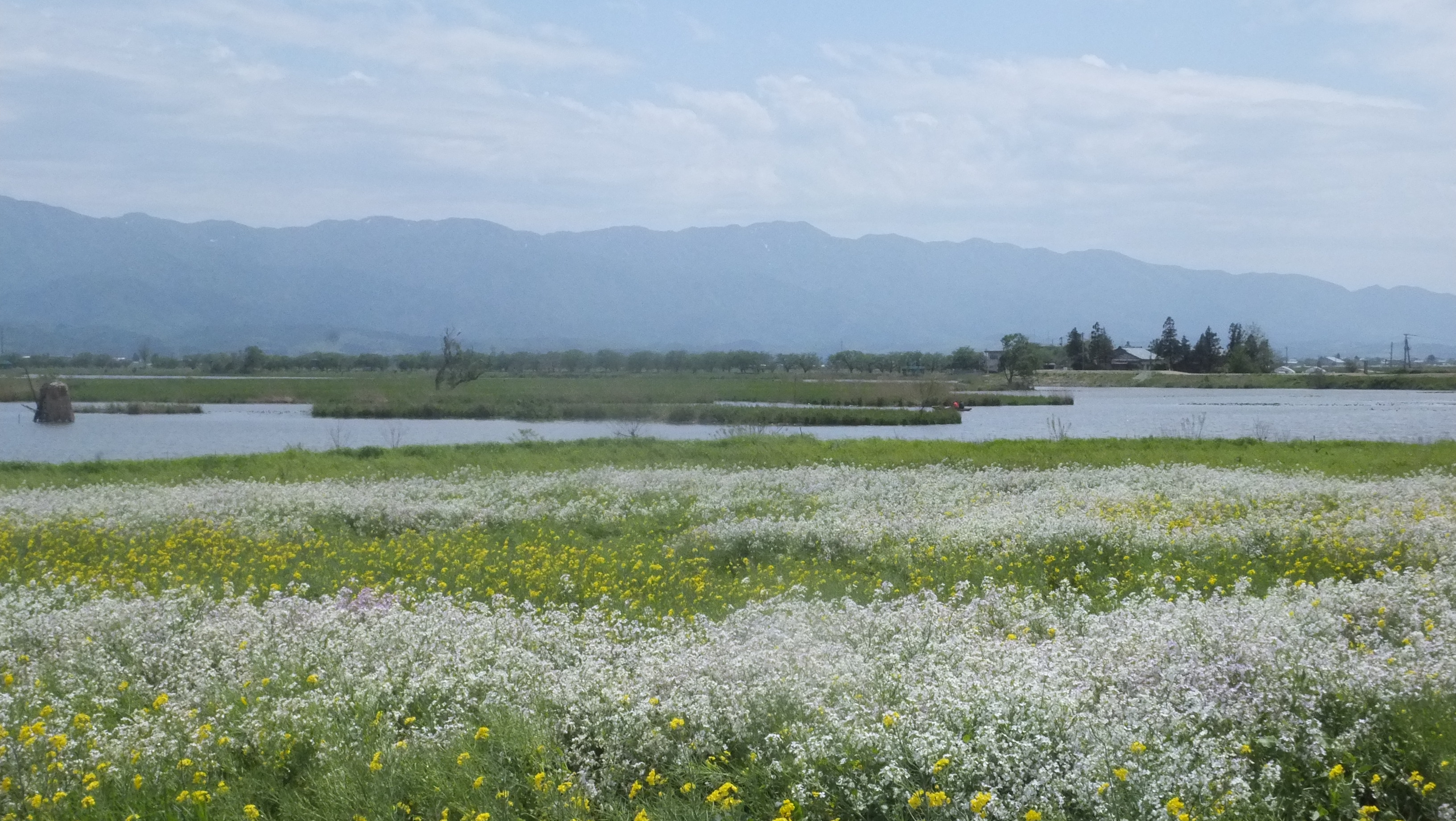 福島潟（新潟市北区）にて